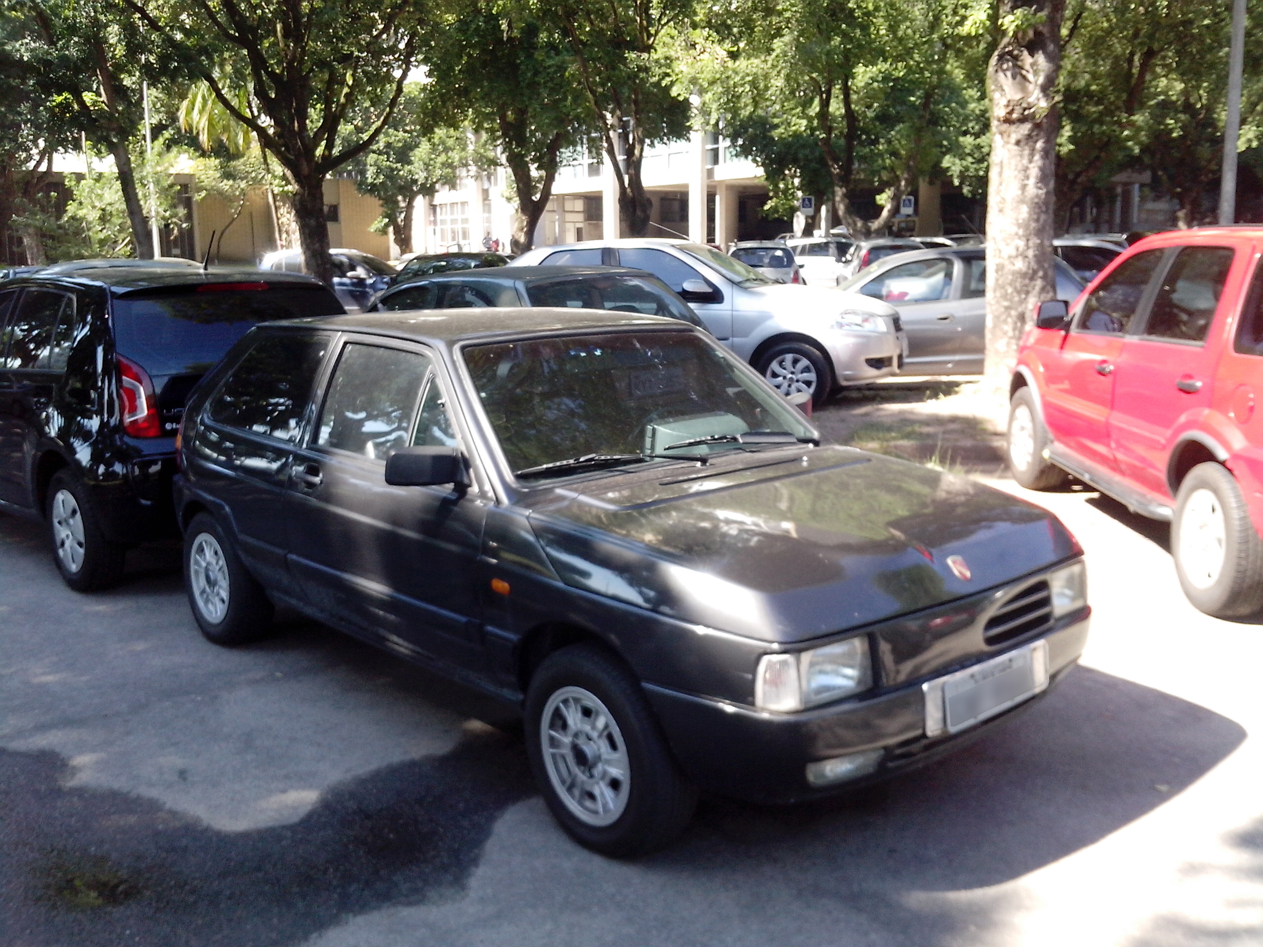 Vista 3/4 do PAG Nick 2000